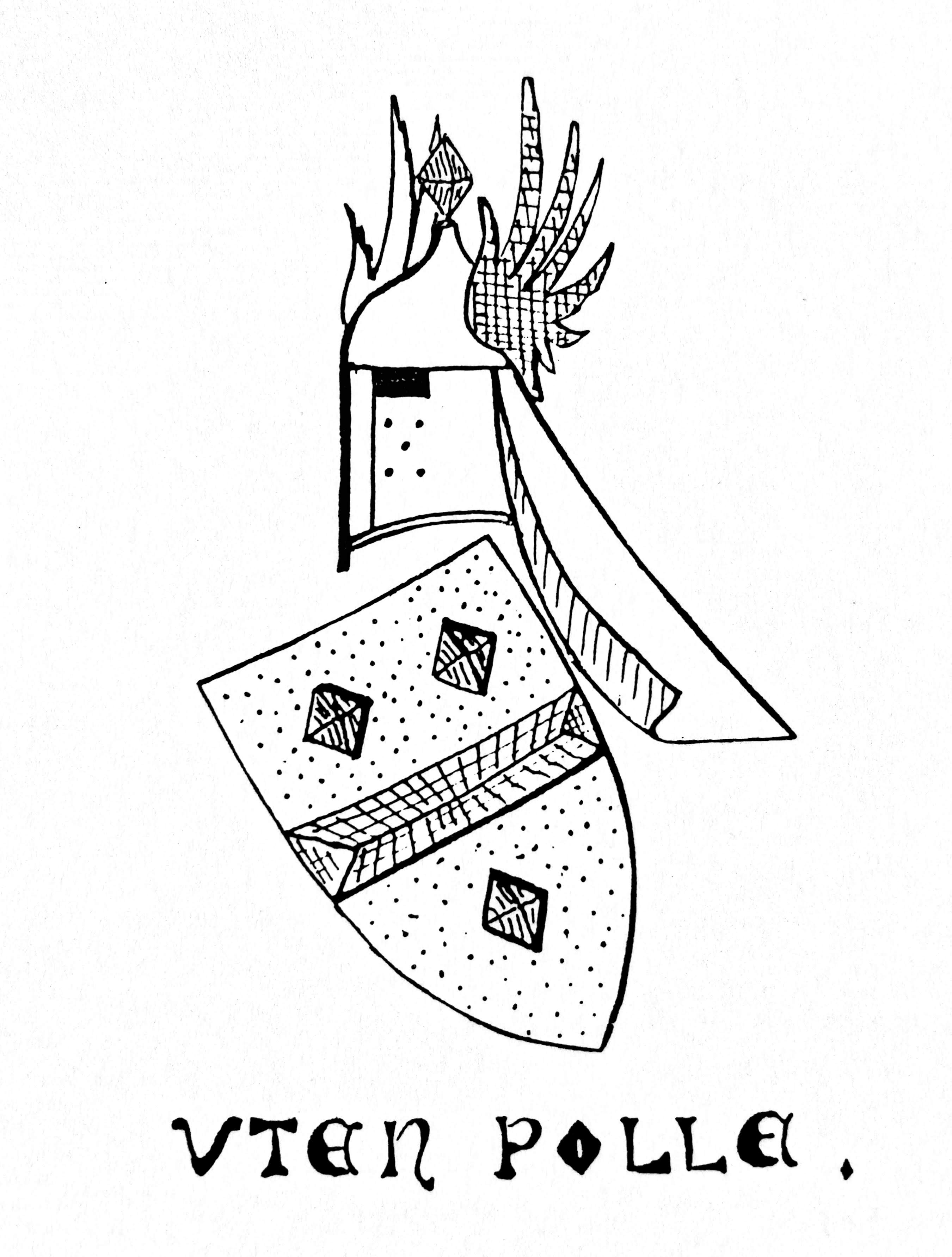 Schets van het originele wapenschild van de familie Van de Poll